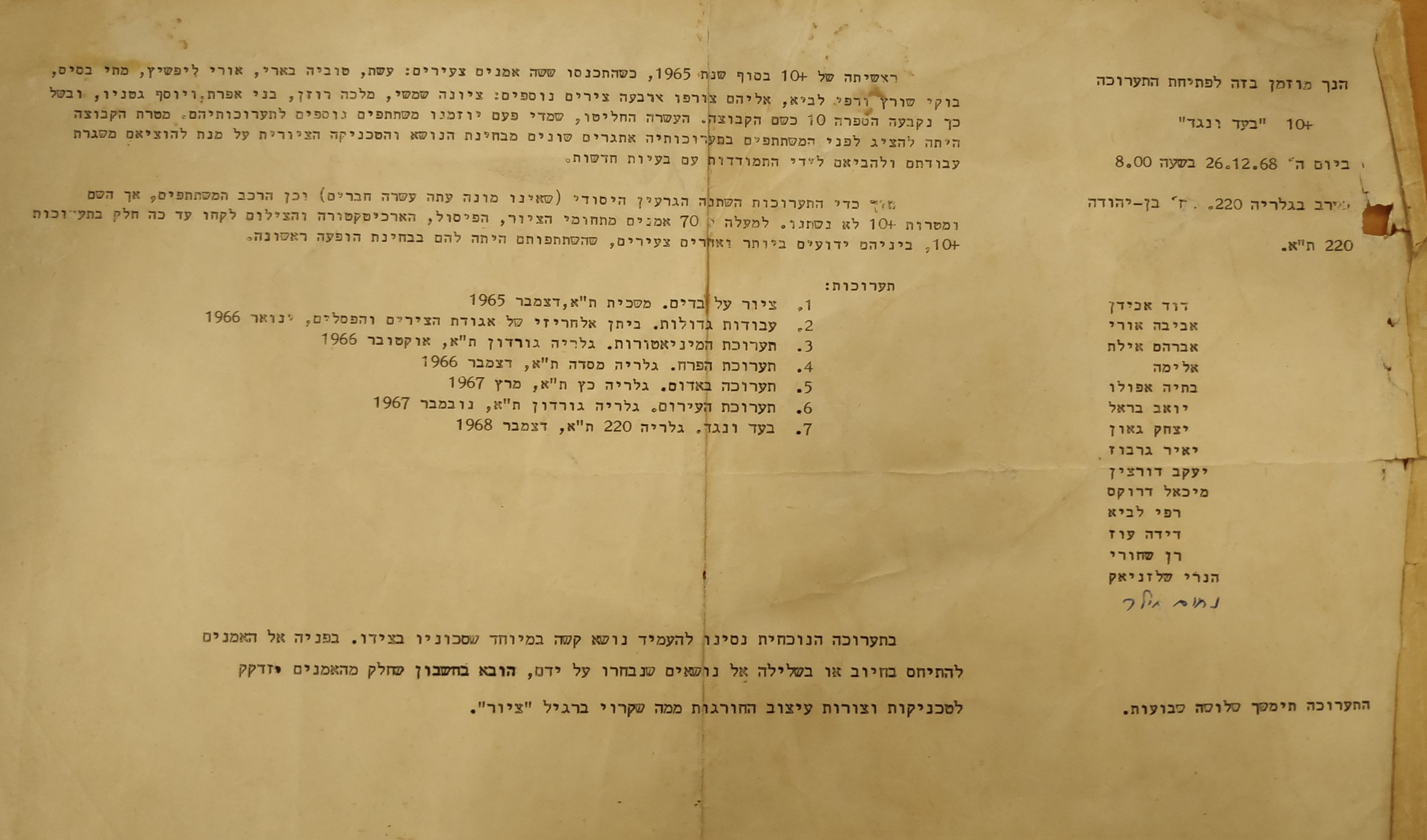 מתוך האוסף של בנו כלב